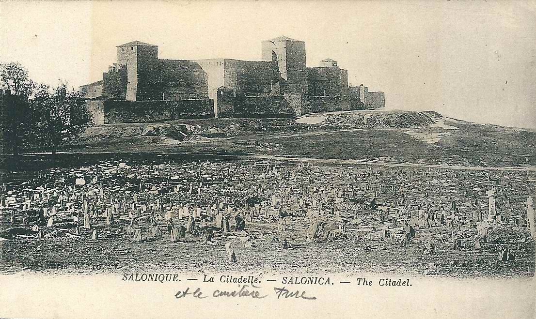 Salonique - La citadelle & en premier plan, le cimetière turc (vers 1918)